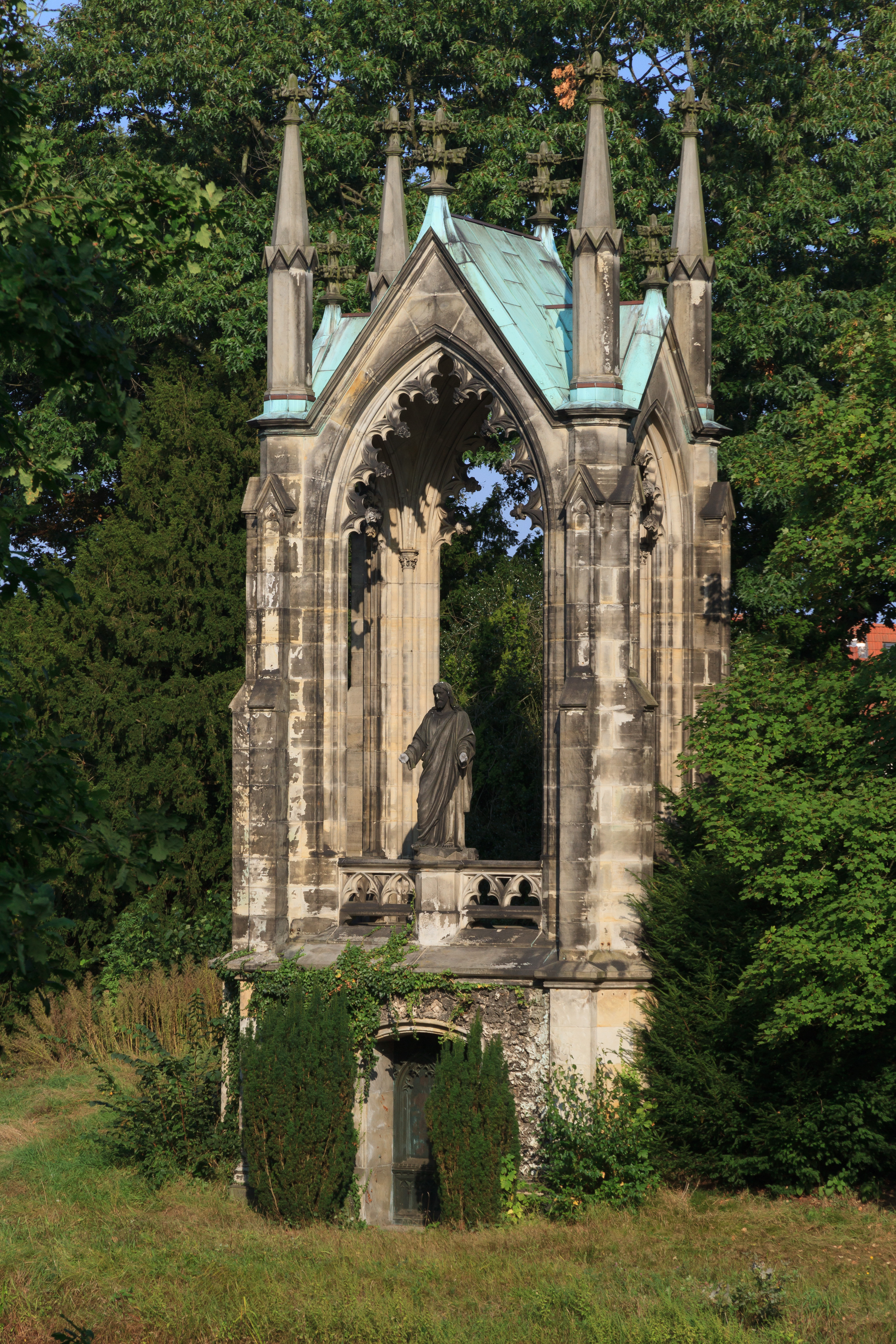 Mausoleum Knoop auf dem Waller Friedhof in Bremen, Im Freien Meer 32Das abgebildete Objekt ist ein geschütztes Kulturdenkmal in der Freien Hansestadt Bremen, mit der Nr. 1695 beim Landesamt für Denkmalpflege registriert.